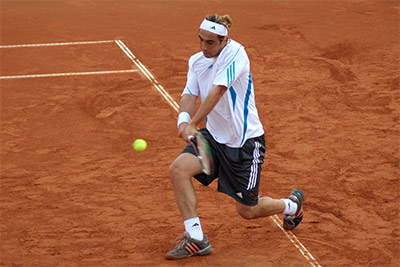 Зор за 26-тия в света Маркос Багдатис; Пловдив, Купа Дейвис: България - Кипър 3:2 2007 Пламен Ташев, Тенис